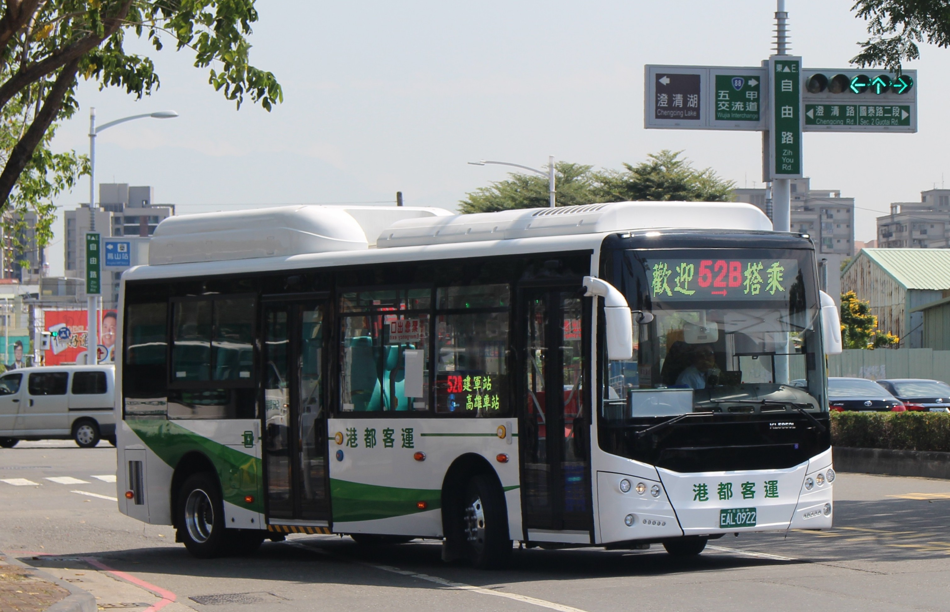 中文（台灣）: 港都客運金龍KL5850L電動公車EAL-0922，行駛高雄市公車52B線。